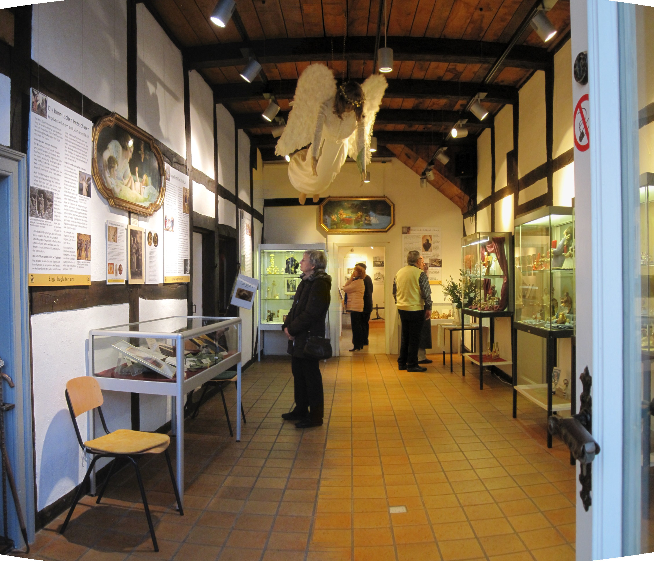 Im Jahr 1856 von Schuhmachermeister Friedrich Köhnsen aus Seelze errichtetes Fachwerkhaus in Seelzes heutigem Ortsteil Letter. Zur Dauerausstellung gehören: Alte Schulstube von 1900, Schuhmacherwerkstatt, gute Stube von 1900 (nutzbar als Trauzimmer) und Friseursalon von 1920, Exponate zur Geschichte der Stadt, ihres Bahnhofs und der 14 Ortsteile. Internetseite des Heimatmuseums Seelze Eingangsraum, fotografiert während der Sonderausstellung „Engel begleiten uns“.